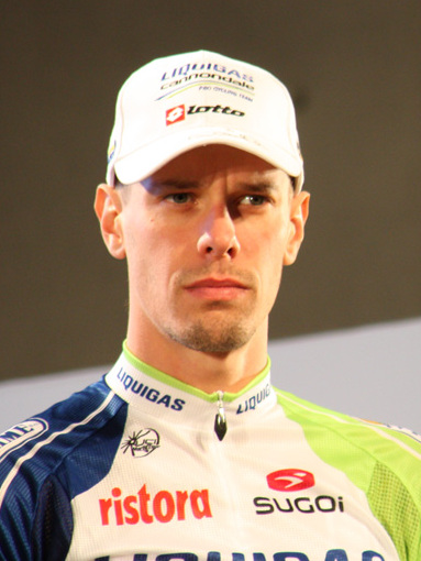 Utsunomiya 19/Oct/2012